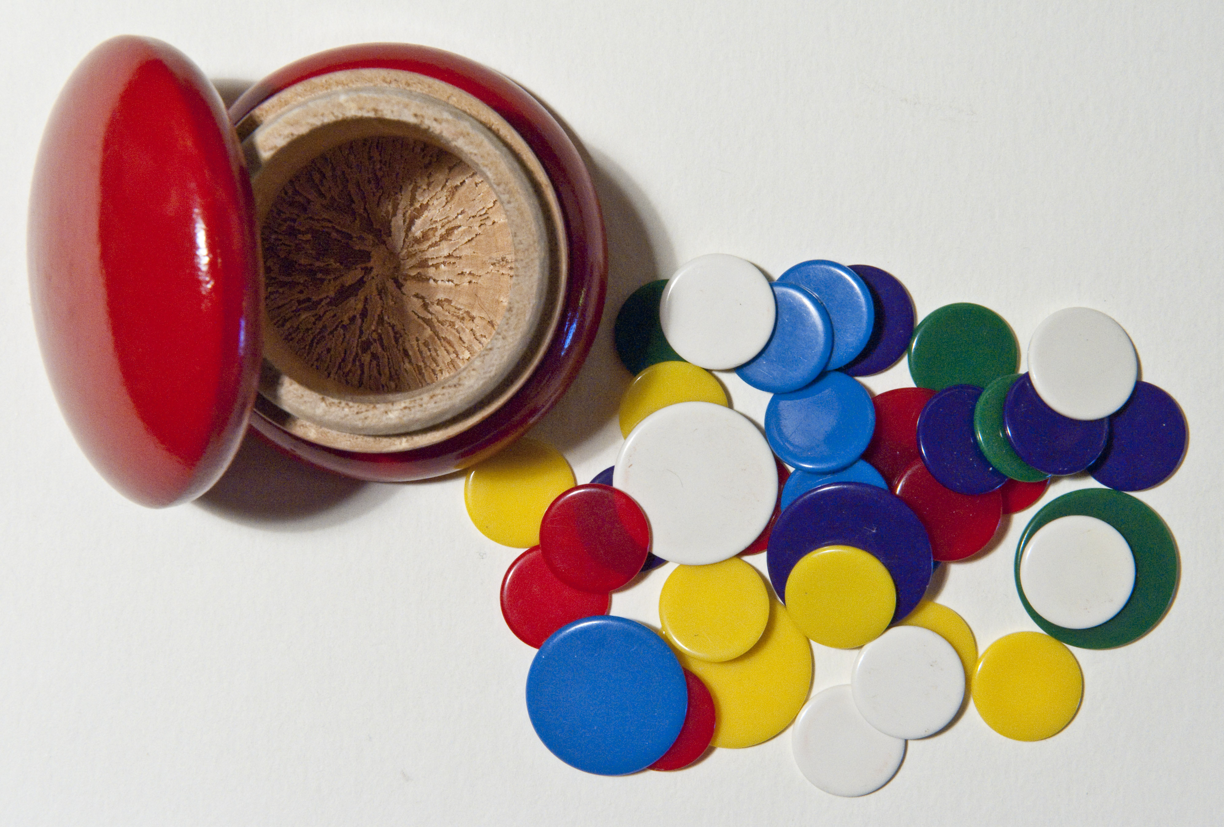 Toys from the late 1950s - Flohspiel Beiliegende Gebrauchsanweisung: Jeder Spieler erhält eine große Marke und eine entsprechende Anzahl kleiner Marken. Zu Beginn des Spiels stellt man den geöffneten Becher in die Mitte des Tisches, den man am besten mit einer dicken Decke belegt. Jeder Teilnehmer legt die kleinen Marken in gleicher Entfernung vom Becher auf die Tischdecke. Der Reihe nach wird nun von jedem Teilnehmer einmal geknipst, d.h. mit der großen Marke wird auf den Rand der kleinen Marke dermaßen gedrückt, daß letztere durch einen Sprung in den Becher fällt. Wer eine seiner Marken in den Becher gebracht hat, darf noch einmal knipsen. Sobald eine Marke vom Tisch fällt, muß sie wieder an ihren Ausgangspunkt gelegt werden. Wer zuerst alle Marken in den Becher bringt, hat gewonnen.